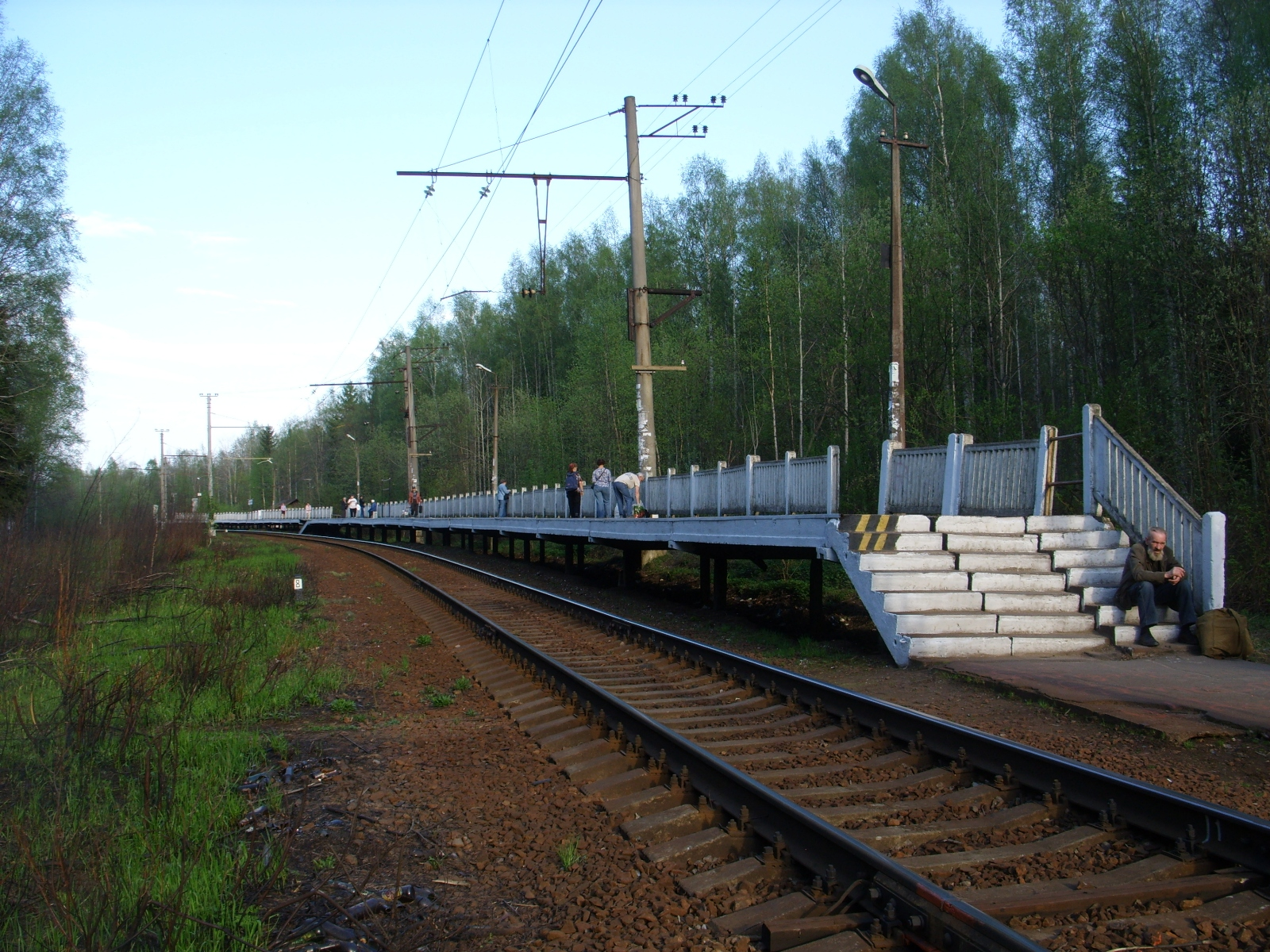 Пл. Ваганово, Ленинградская область. Вид в сторону Ладожского Озера